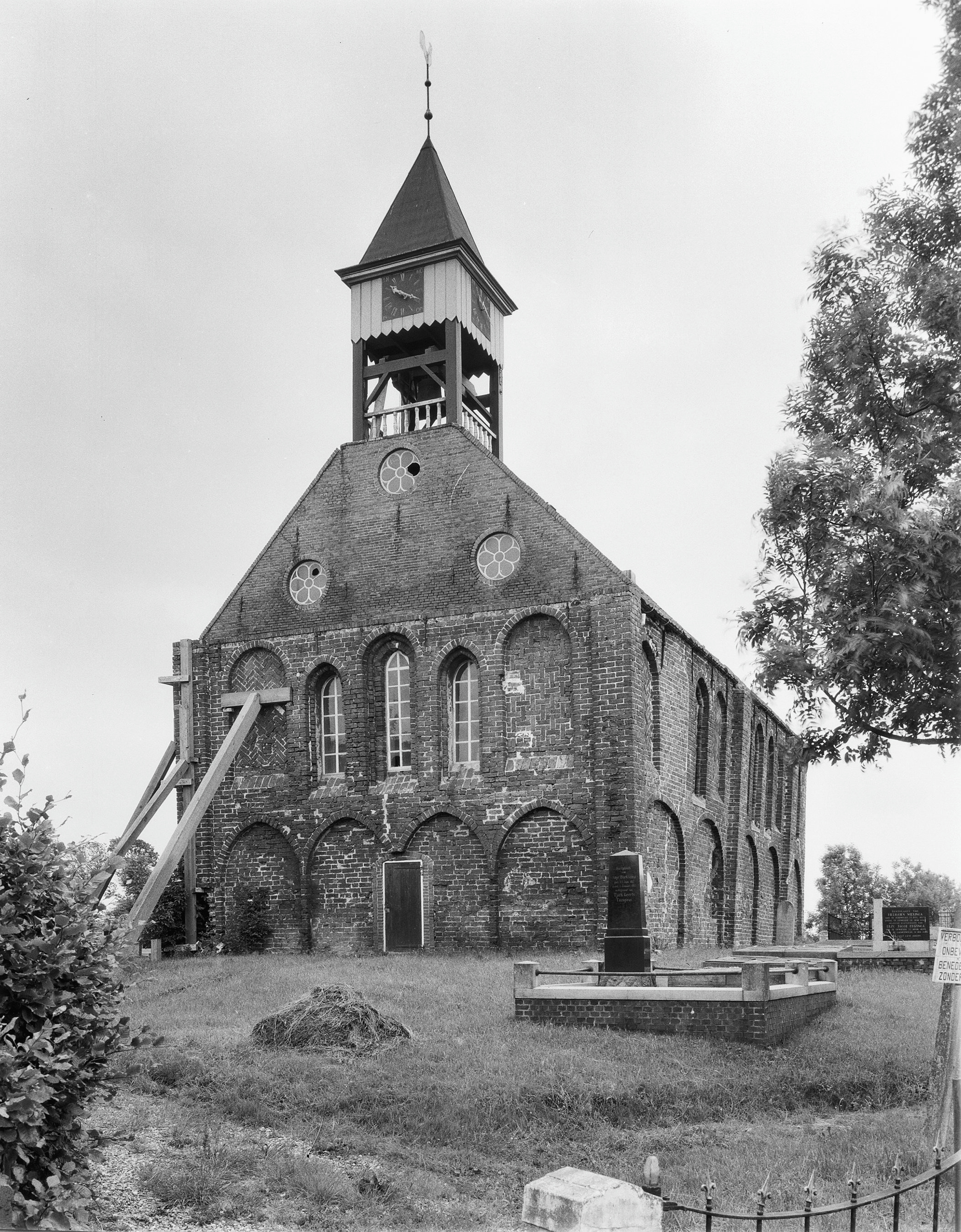 Nederlands Hervormde Kerk: exterieur naar het zuid-westen